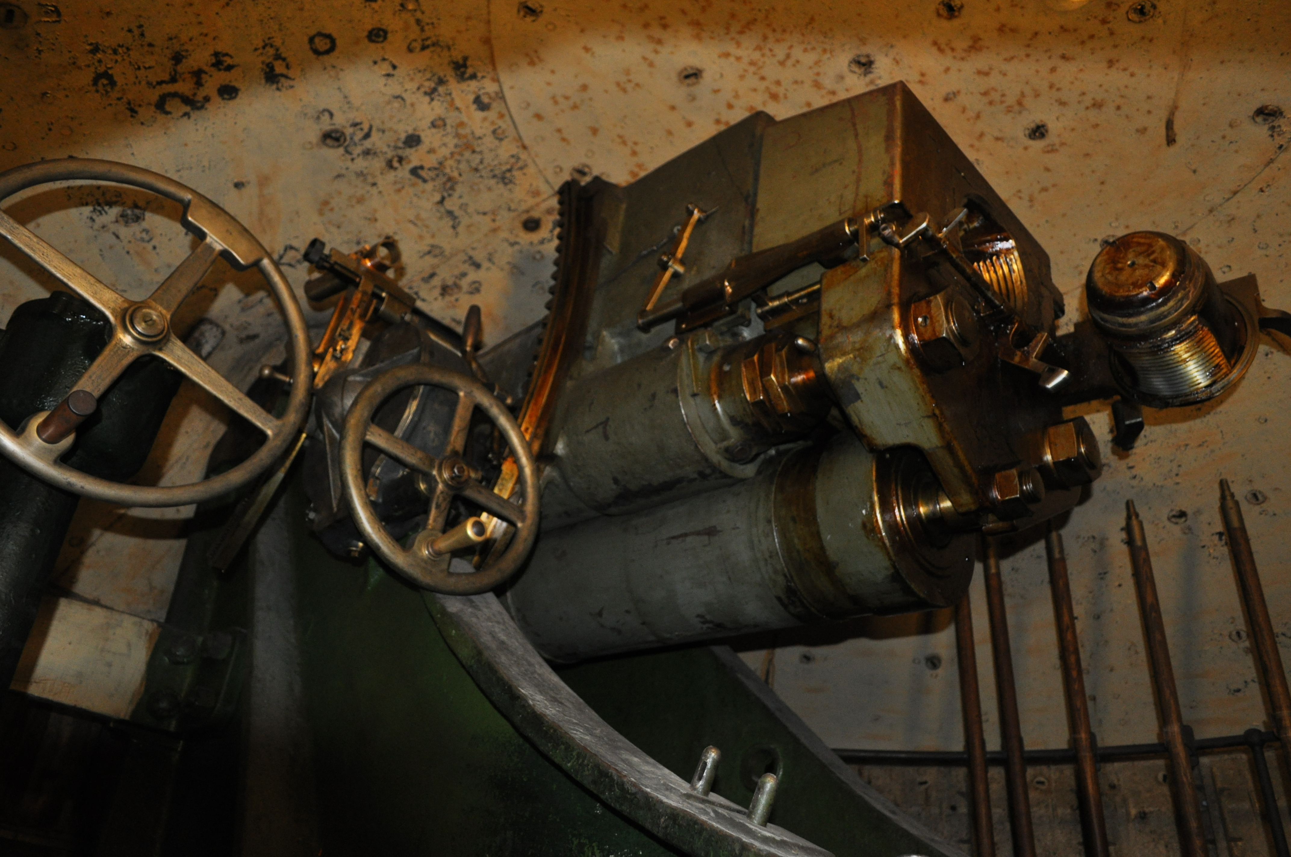 Culatta e otturatore di un pezzo da 149/35 Scheneider in cupola corazzata del forte Montecchio-Lusardi